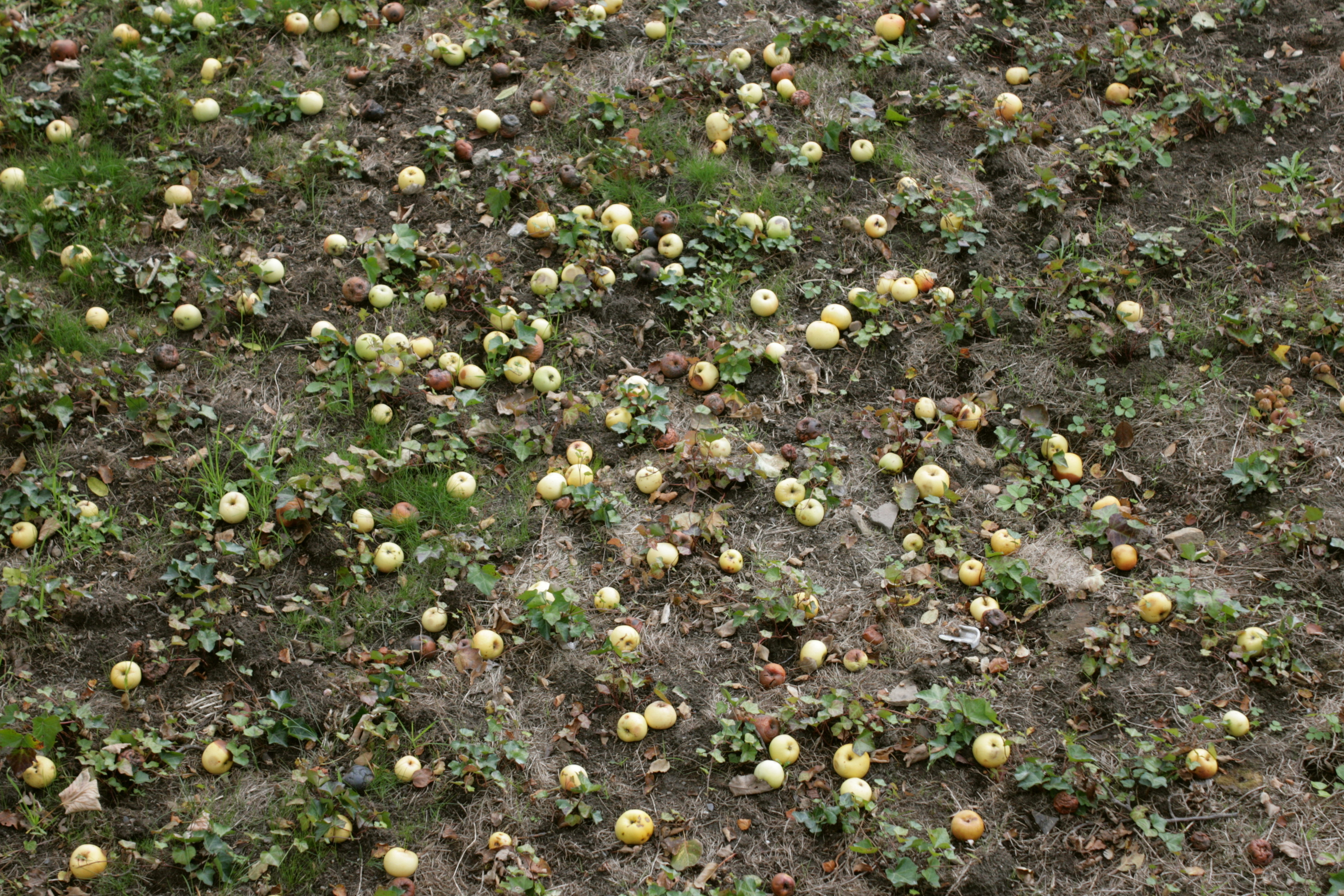 Kadettenstraße in Bergisch Gladbach